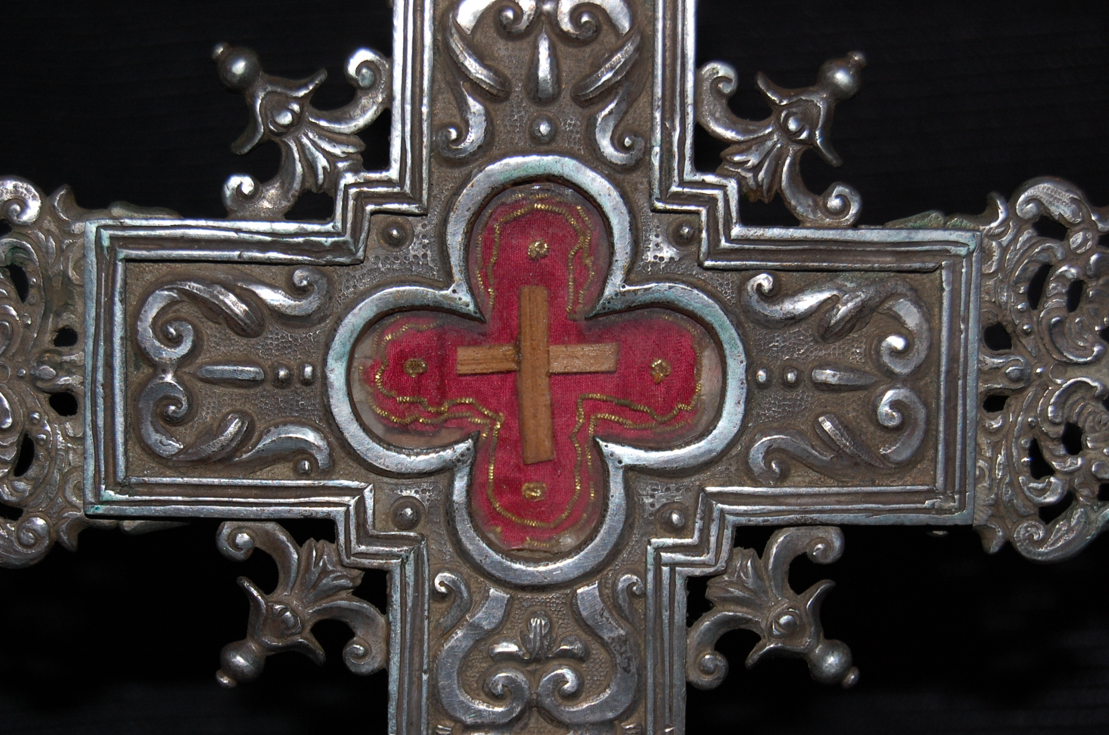 hh